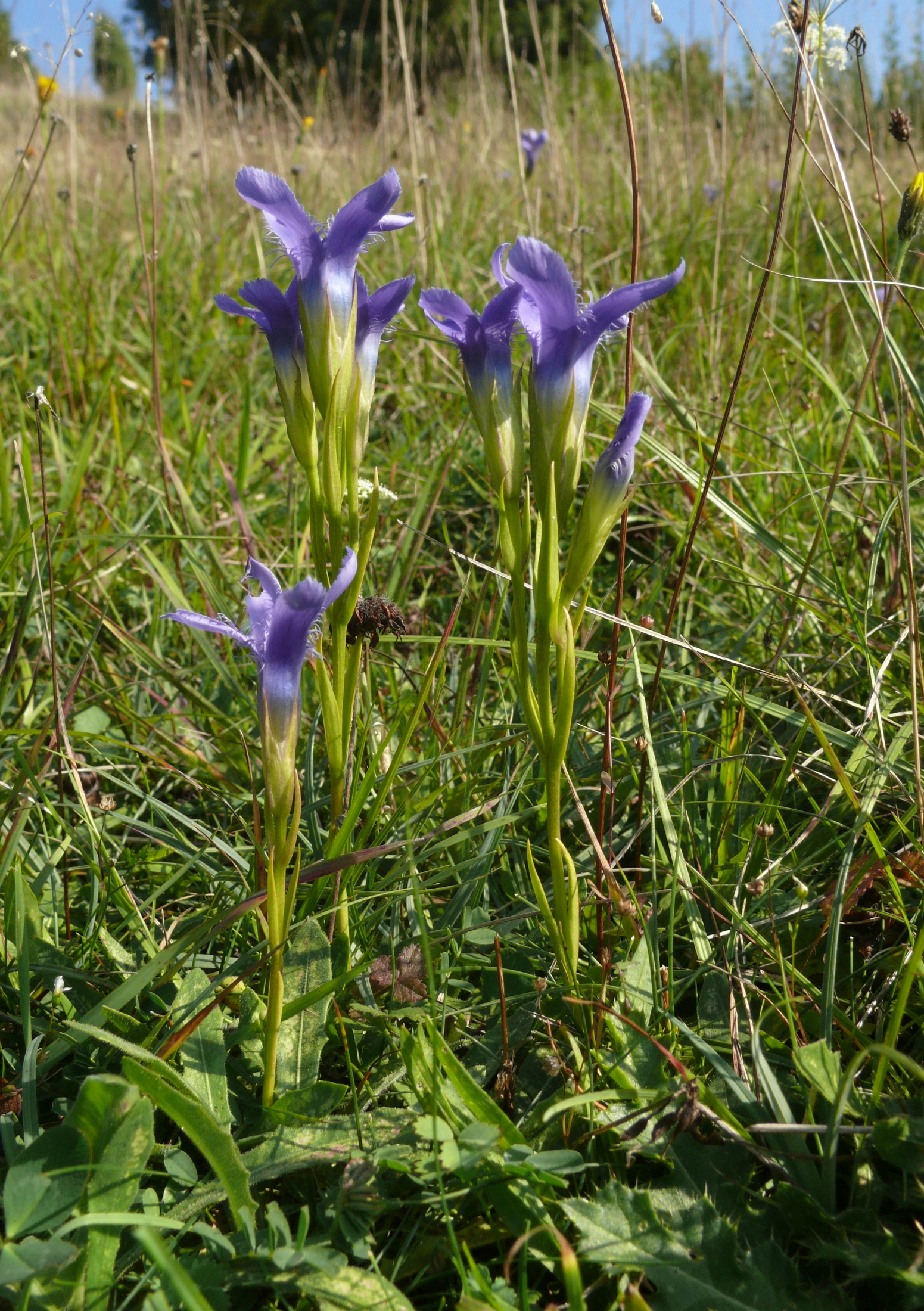 Gentianopsis ciliata, Schwäbische Alb, Germany